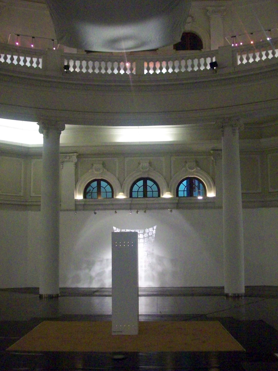 Exhibición Héctor Romero en ECA Espacio de Arte Contemporáneo, Mendoza, Argentina. Objeto de madera, proyección , arena y agua